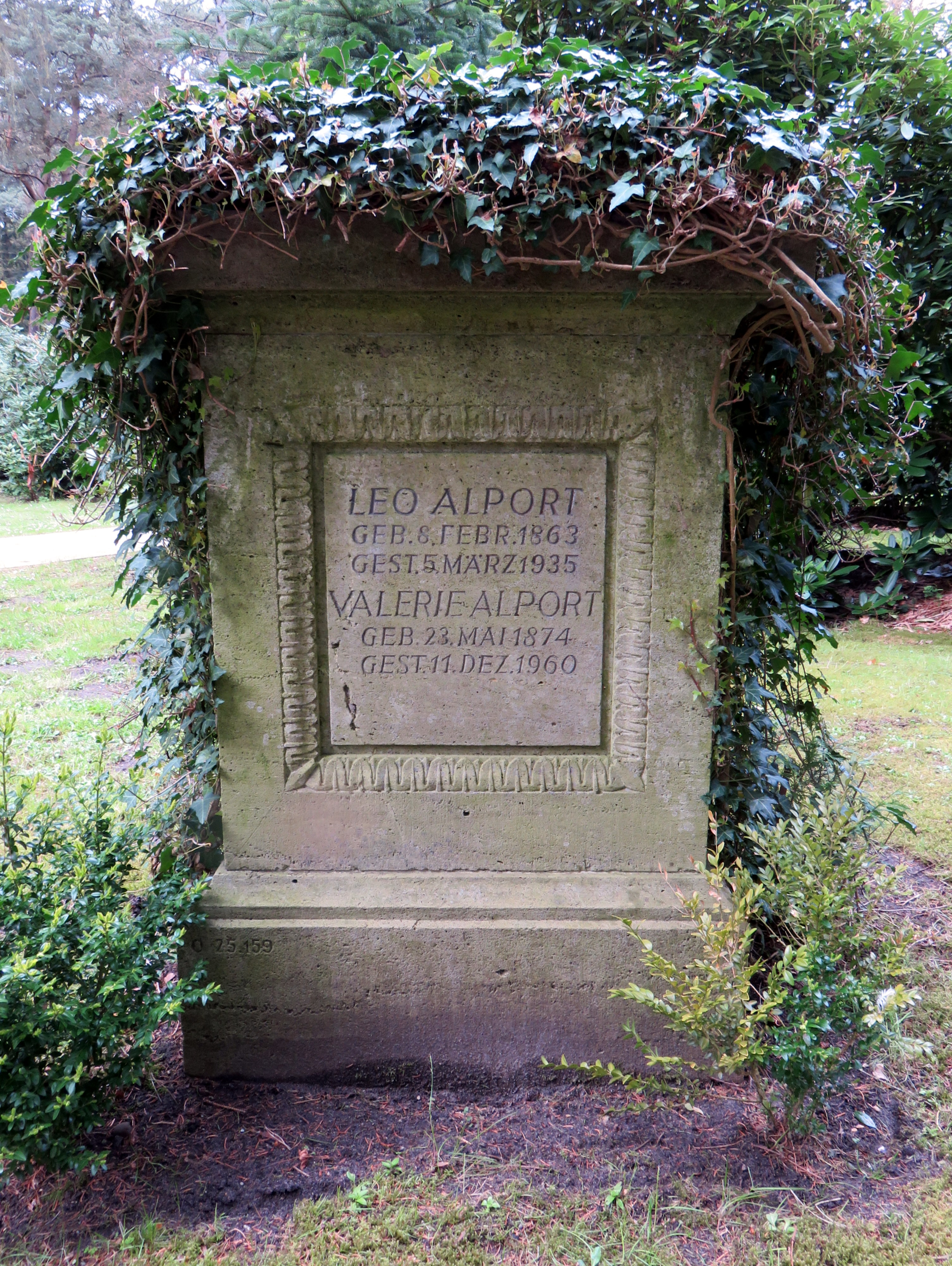 ValerieAlport GdF FriedhofOhlsdorf Historischer Grabstein der deutschen Kunst-Mäzenin Valerie Alport am Zugangsweg zum Gartens der Frauen auf dem Ohlsdorfer Friedhof in Hamburg-Ohlsdorf.